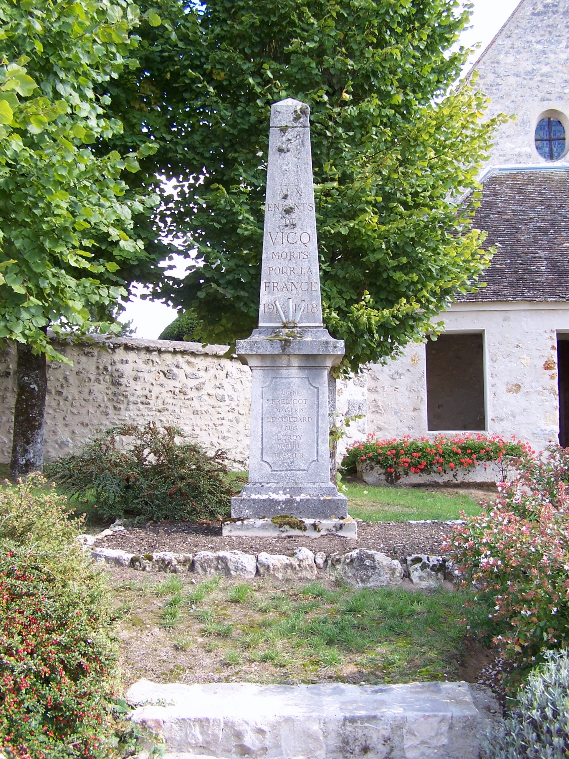 Monument aux morts de Vicq (Yvelines, France)